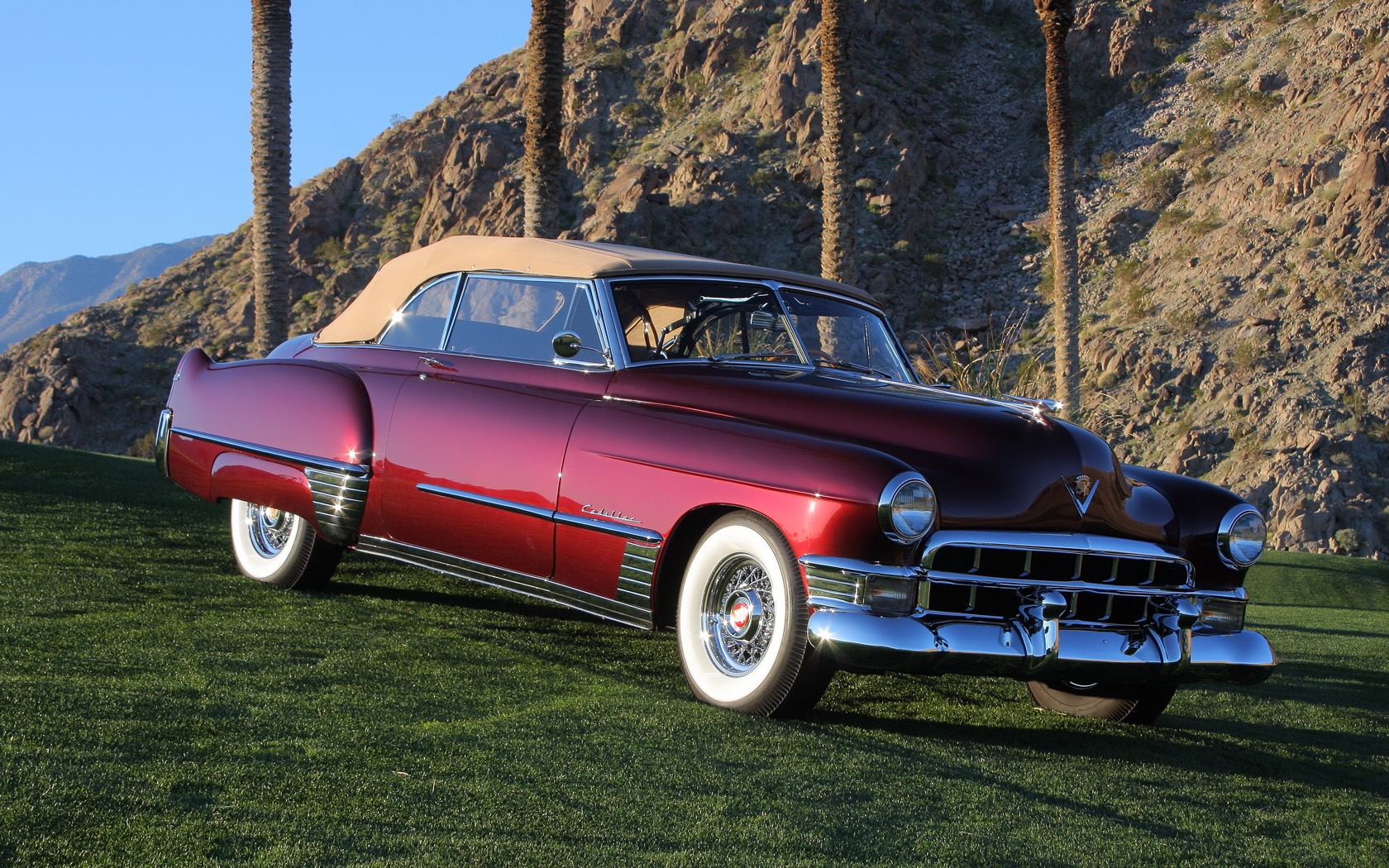 2011 Desert Classic, La Quinta, CA